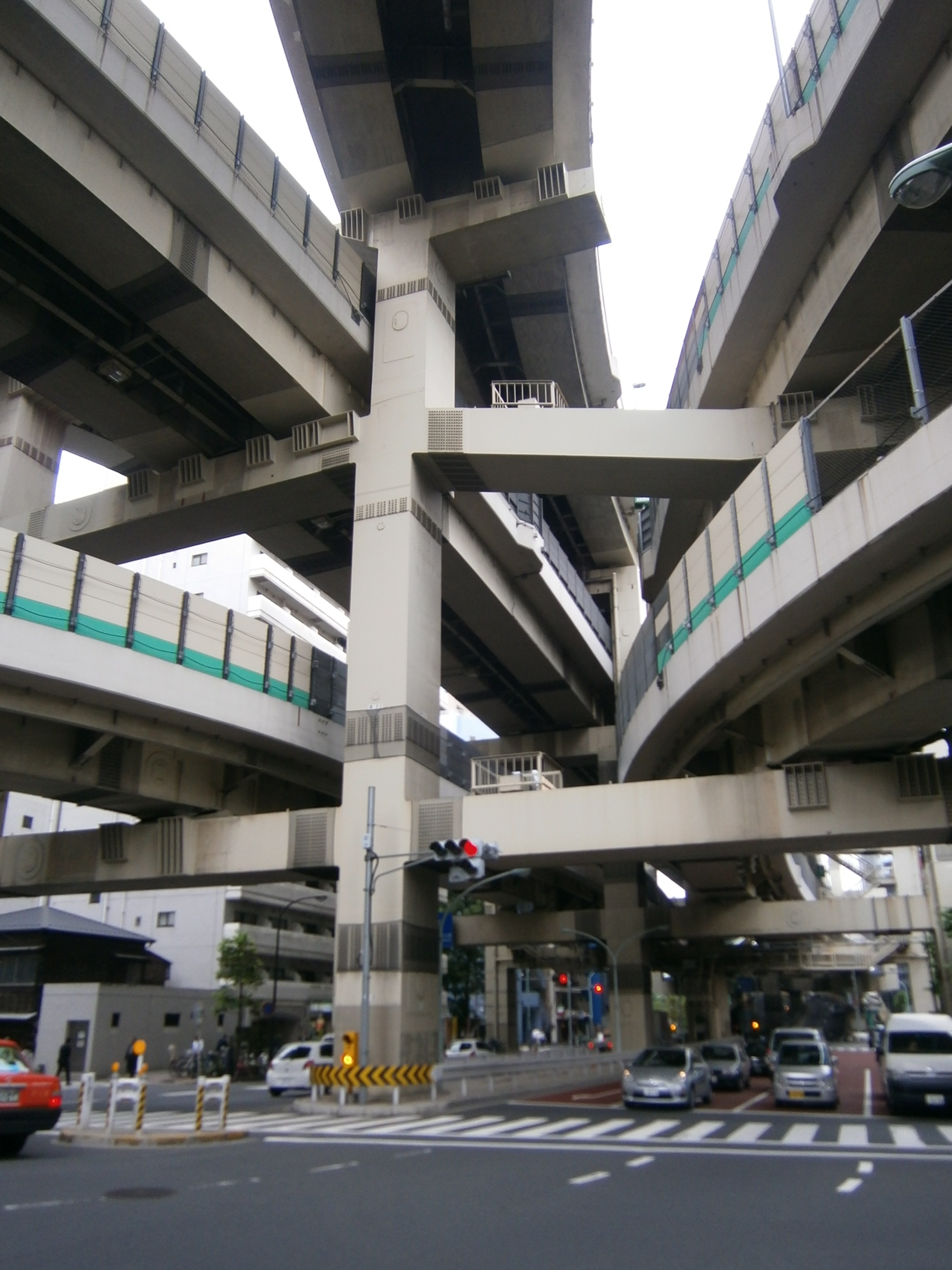 Hakozaki JCT